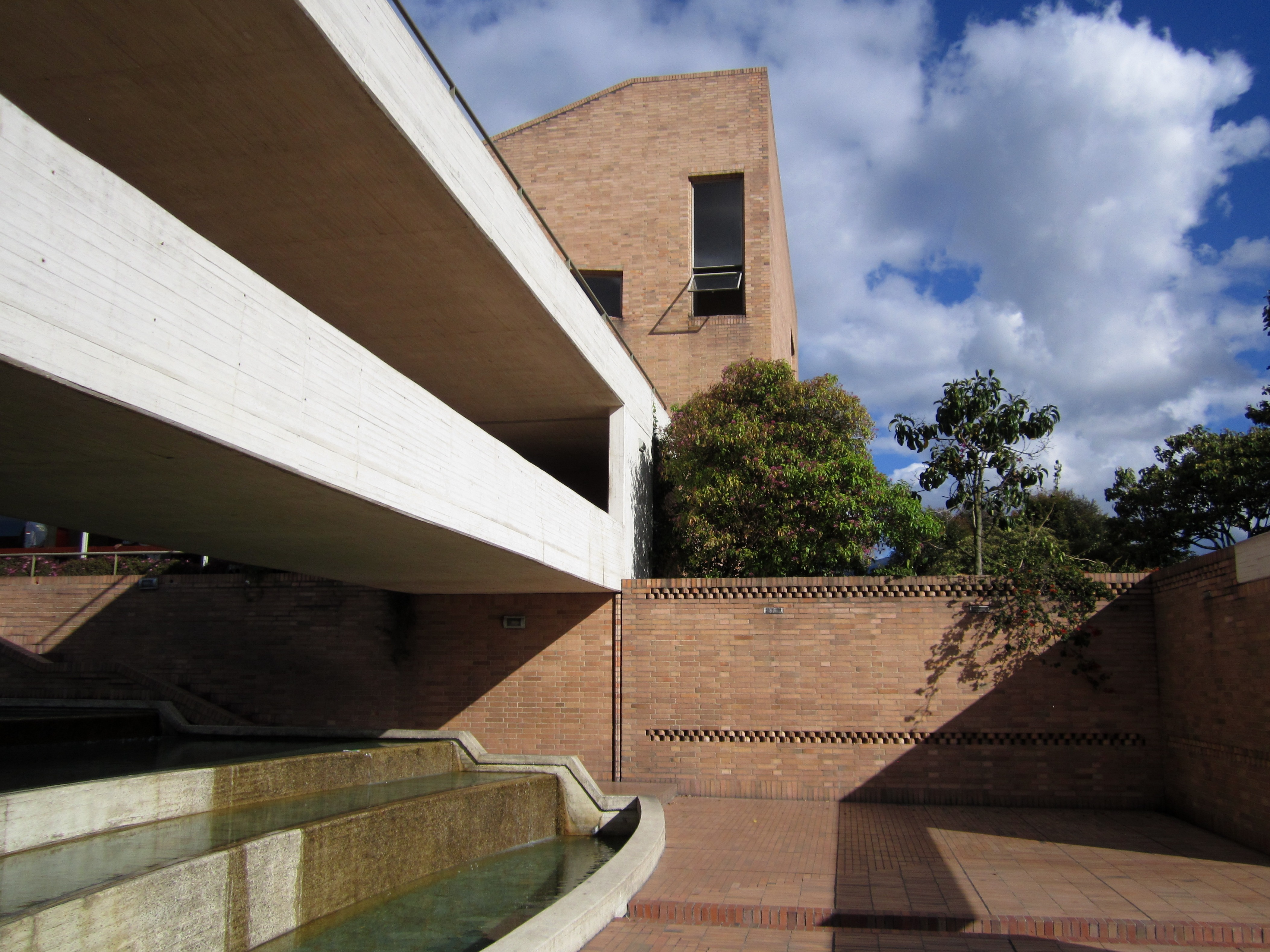 Elementos arquitectónicos del acceso principal de la Biblioteca Virgilio Barco, diseñada por el arquitecto Rogelio Salmona como parte del Parque Metropolitano Simón Bolívar. Se inauguró el 21 de diciembre de 2001.